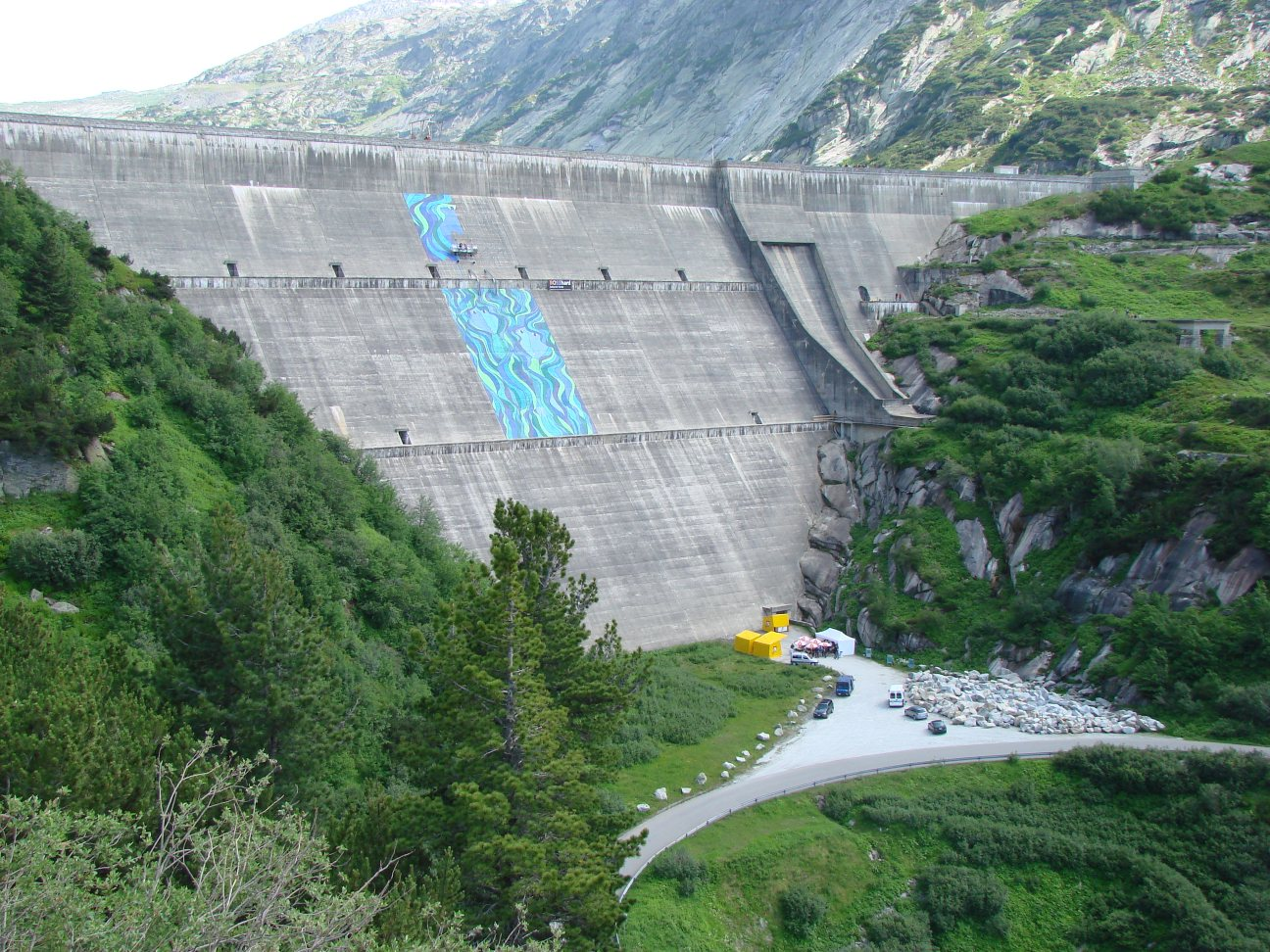 Staumauer Räterichsbodensee mit dem Mélisande-Bild